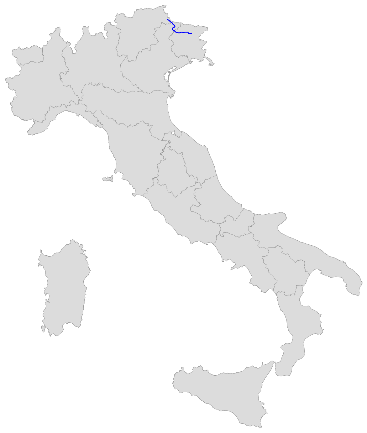 Percorso della SS 52 Carnica